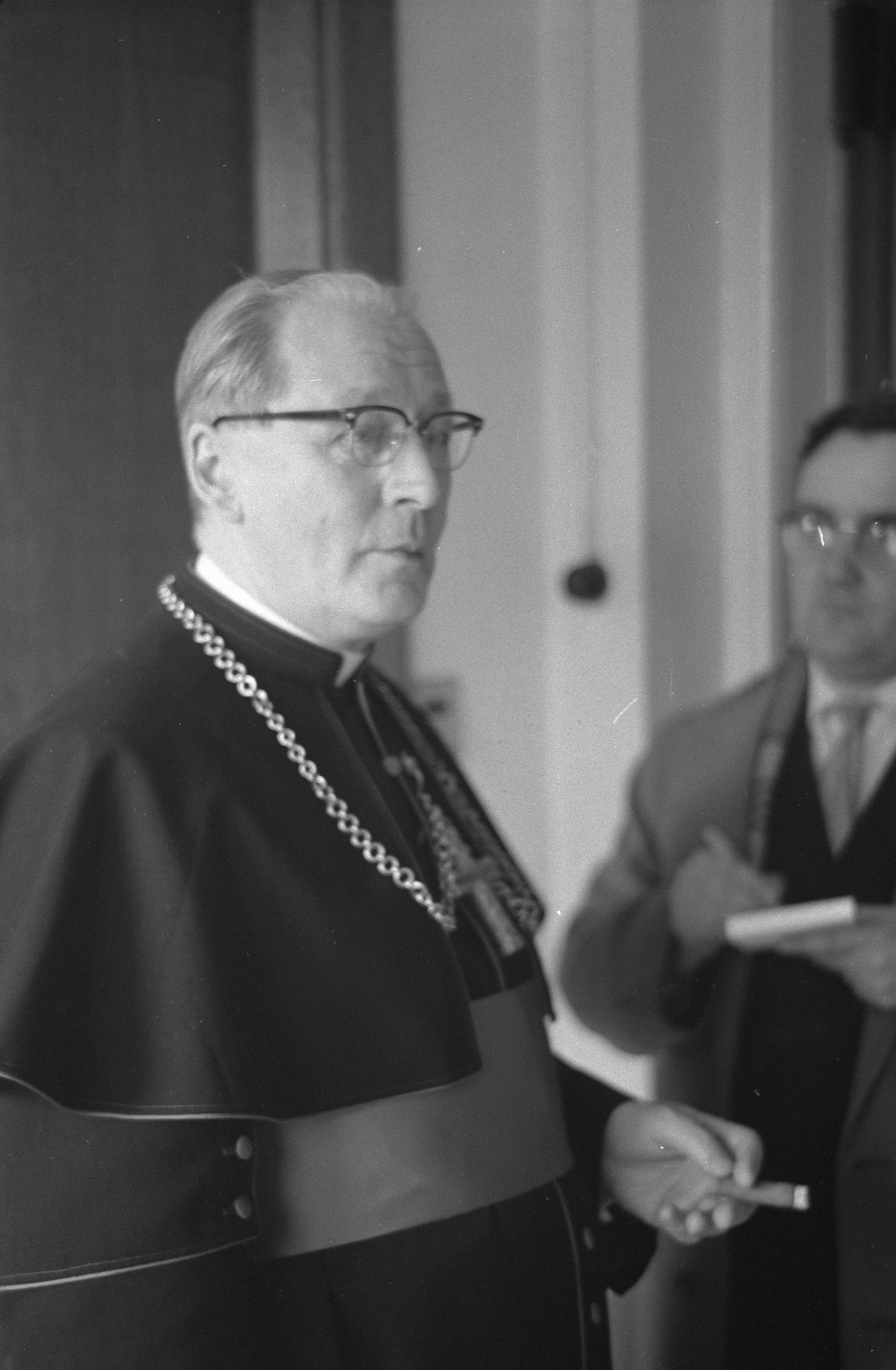 Bisschoppelijk Paleis in Utrecht getooid met vlaggen i.v. de benoeming van Bisschop Alfrink tot kardinaal. Location: Utrecht